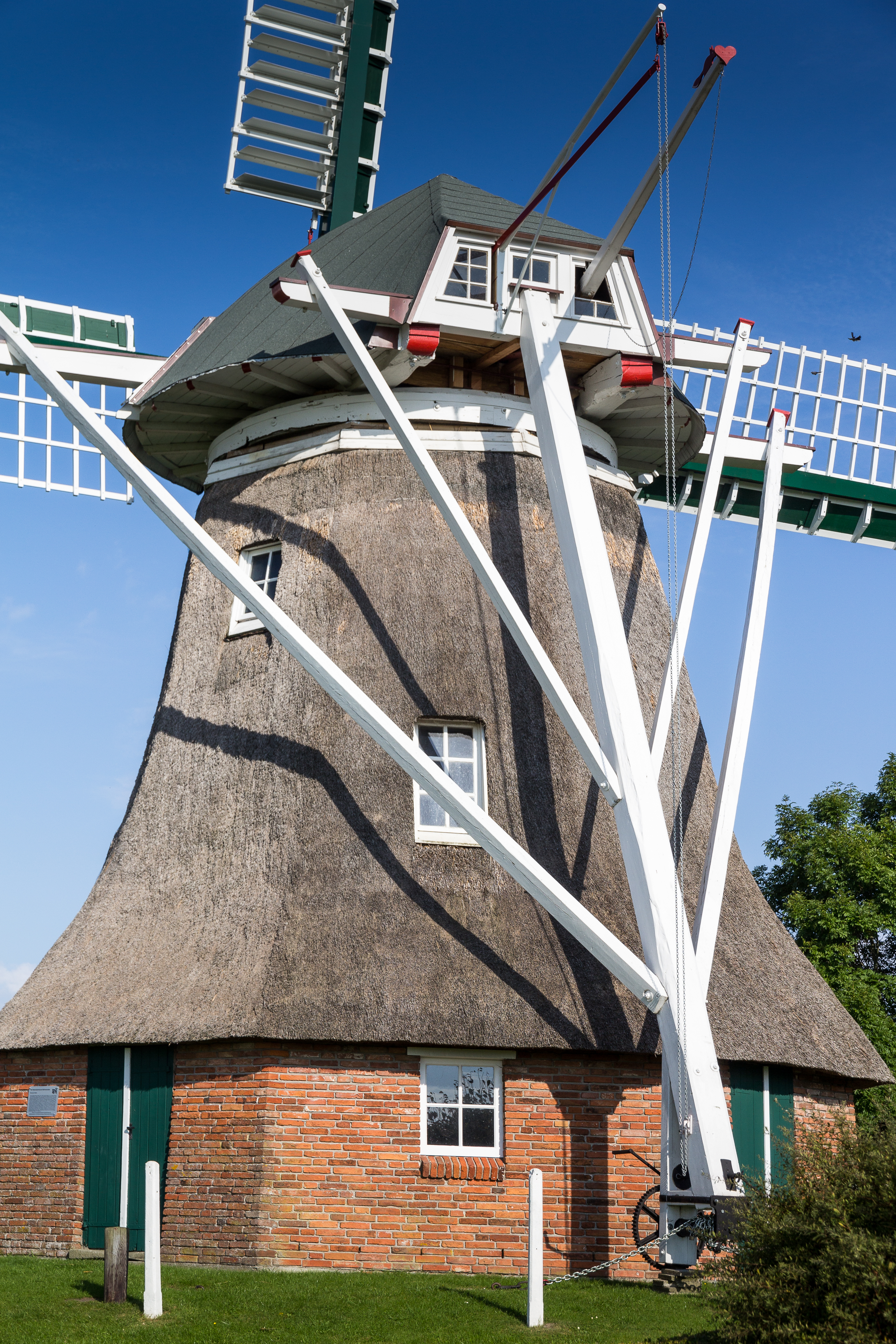 Steert der Berdumer Windmühle, Landkreis Wittmund (Bj. 1829)